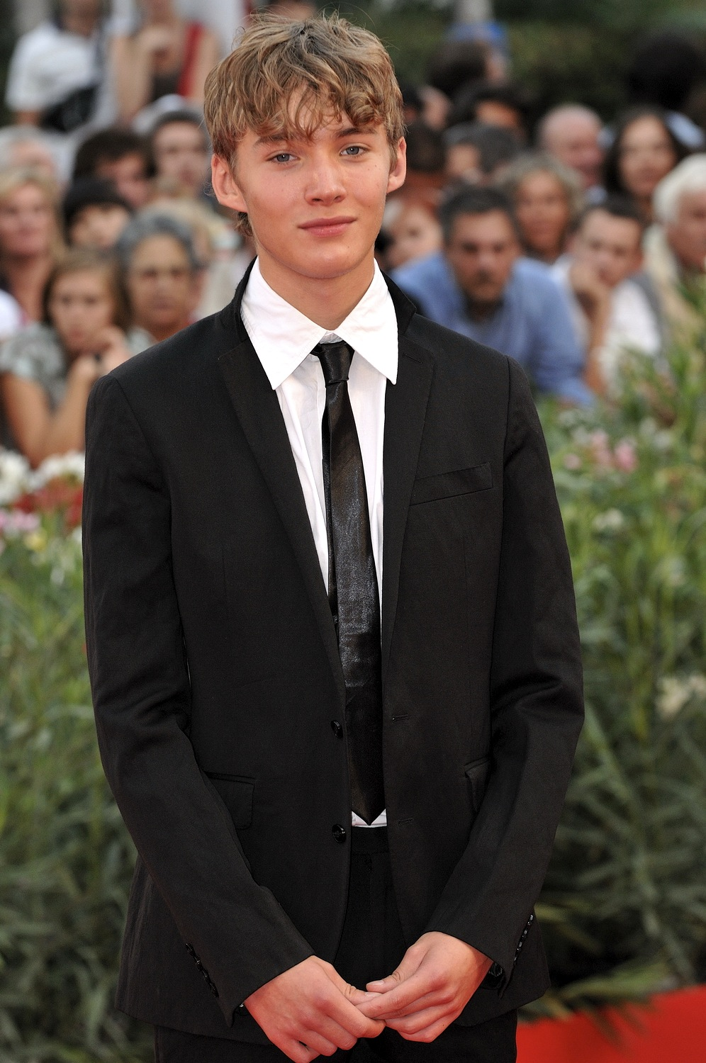 66ème Festival du Cinéma de Venise (Mostra), 11ème jour (12/09/2009) Tapis rouge pour la soirée de cloture du Festival de Venise 2009